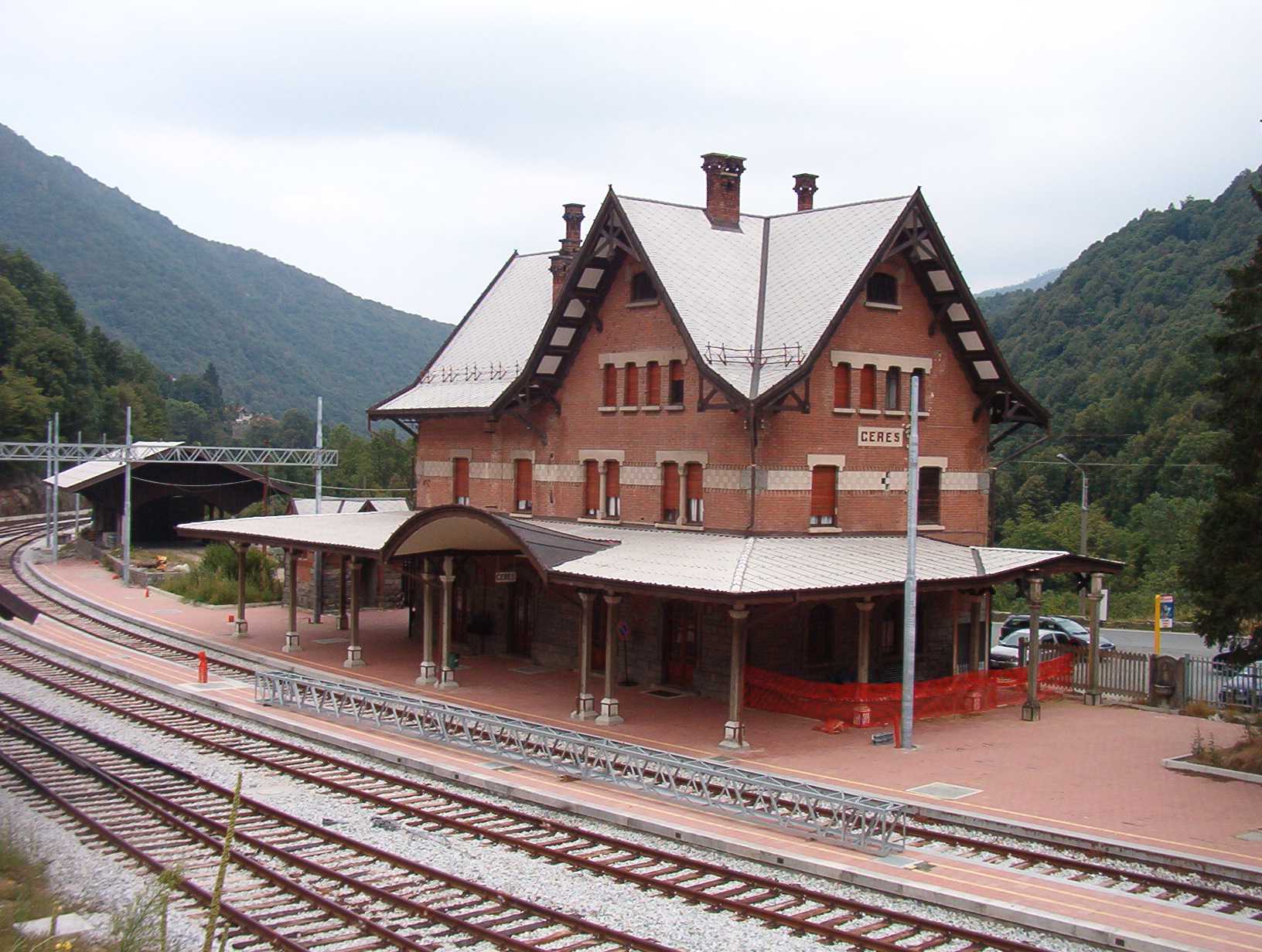 Stazione Ferroviaria - Ceres - Piedmont - Italy